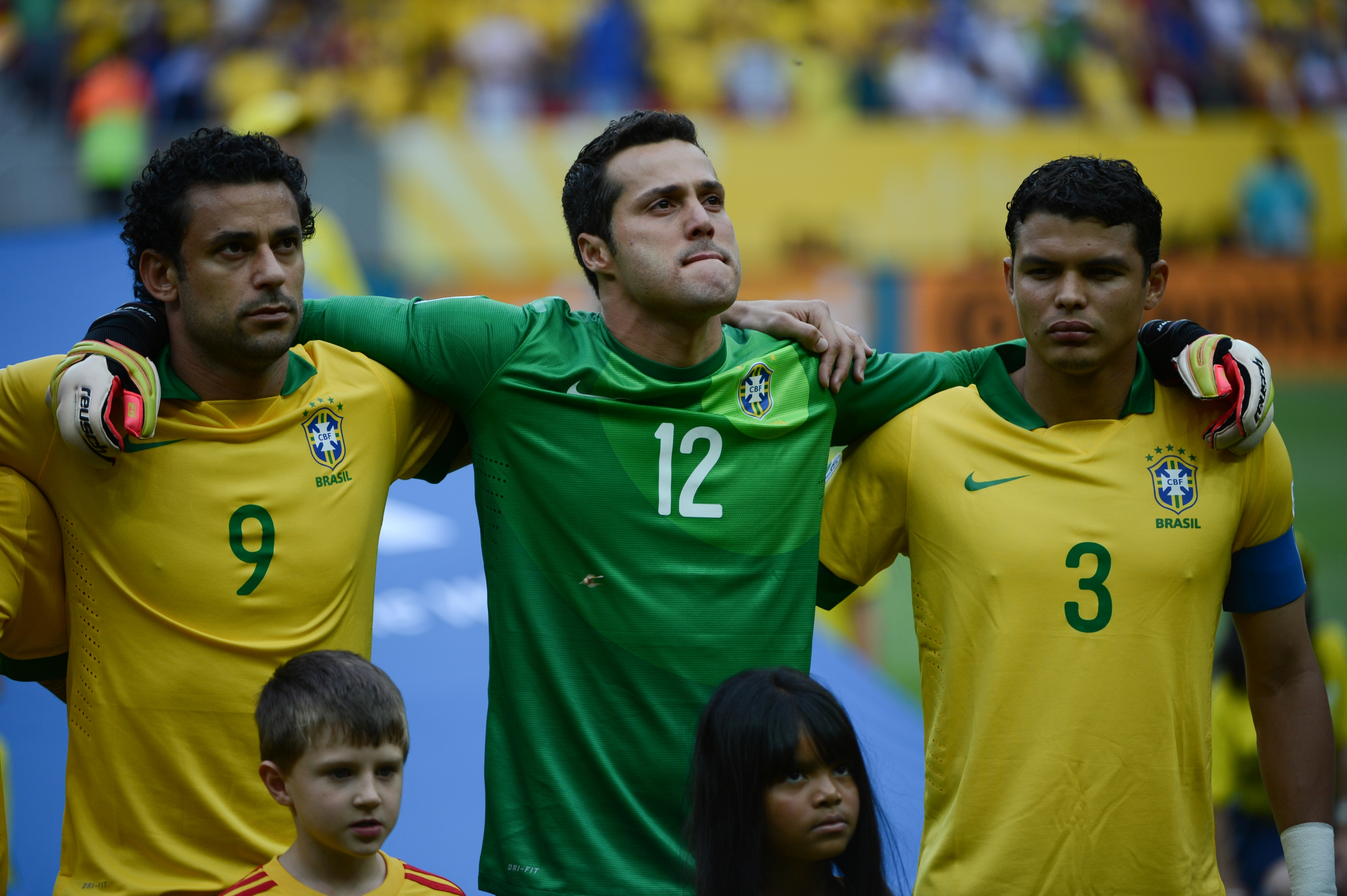 Jogo entre Brasil e Japão abre a Copa das Confederações